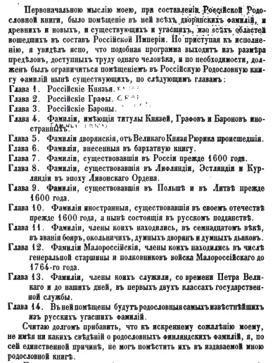 Страница "Российской родословной книги" П. В. Долгорукова (1854), содержащая план издания